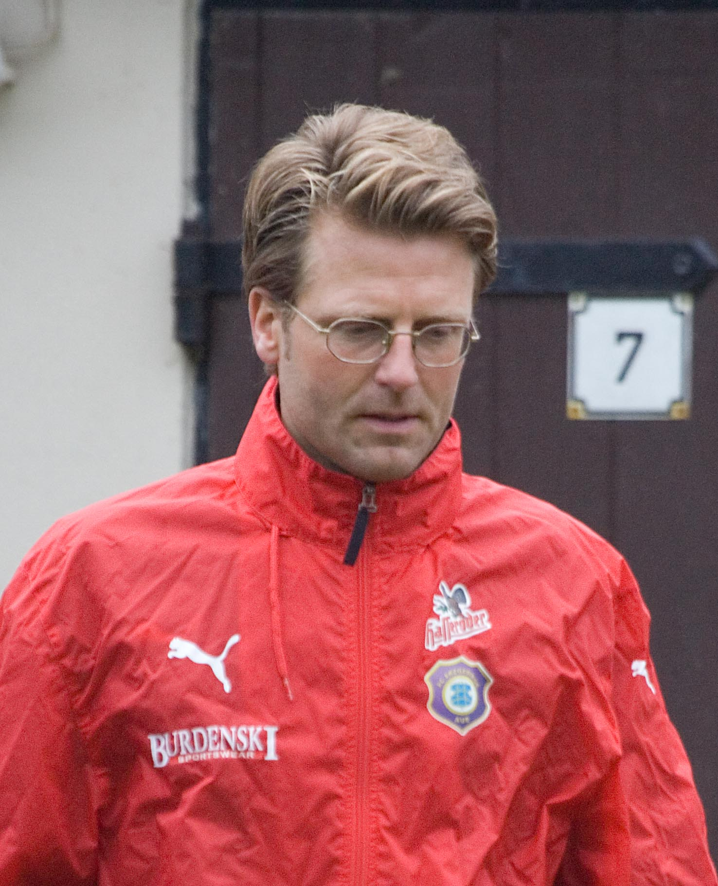 Rico Schmitt; Fußballer und Trainer